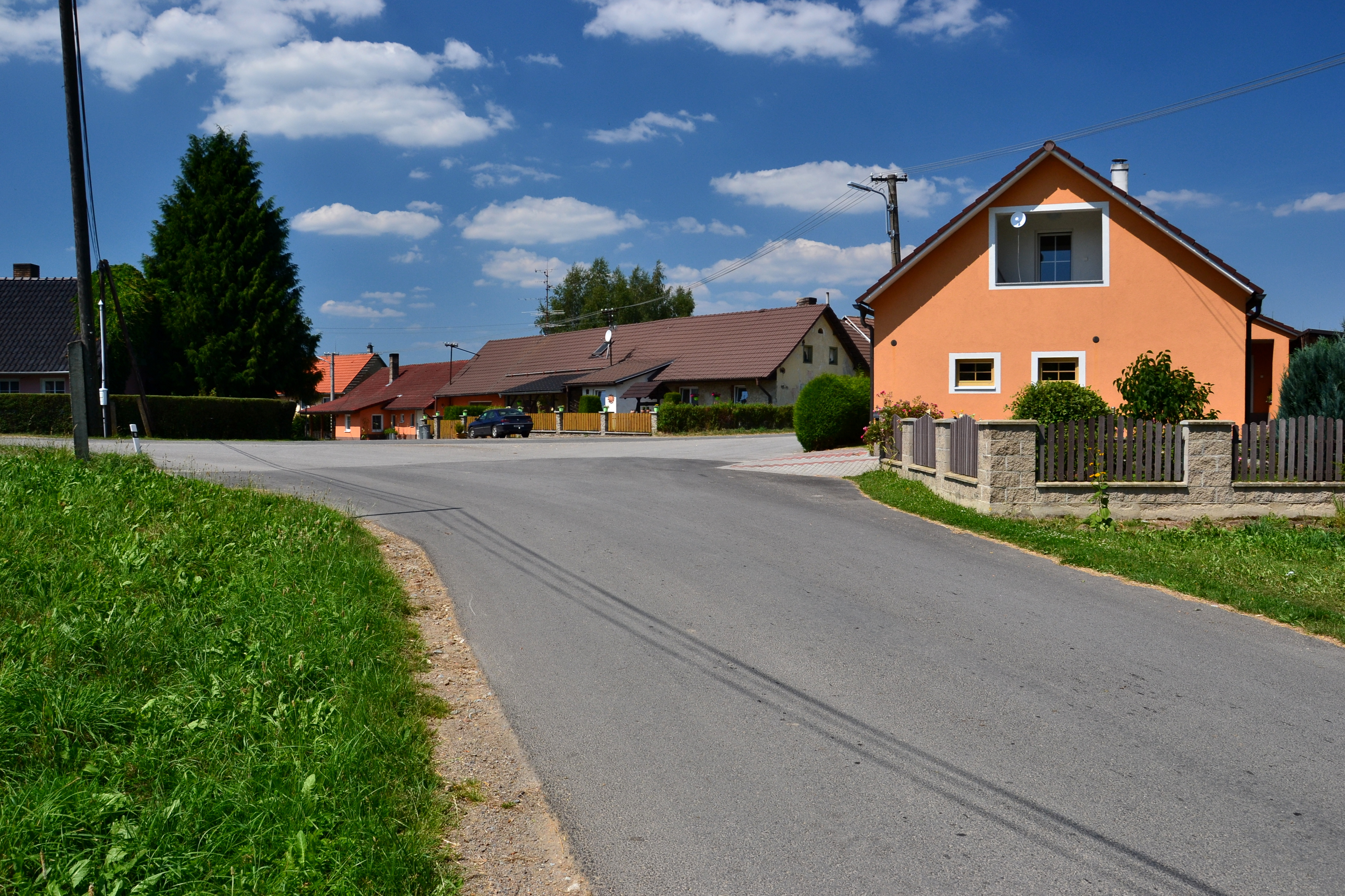 Západní část vesnice